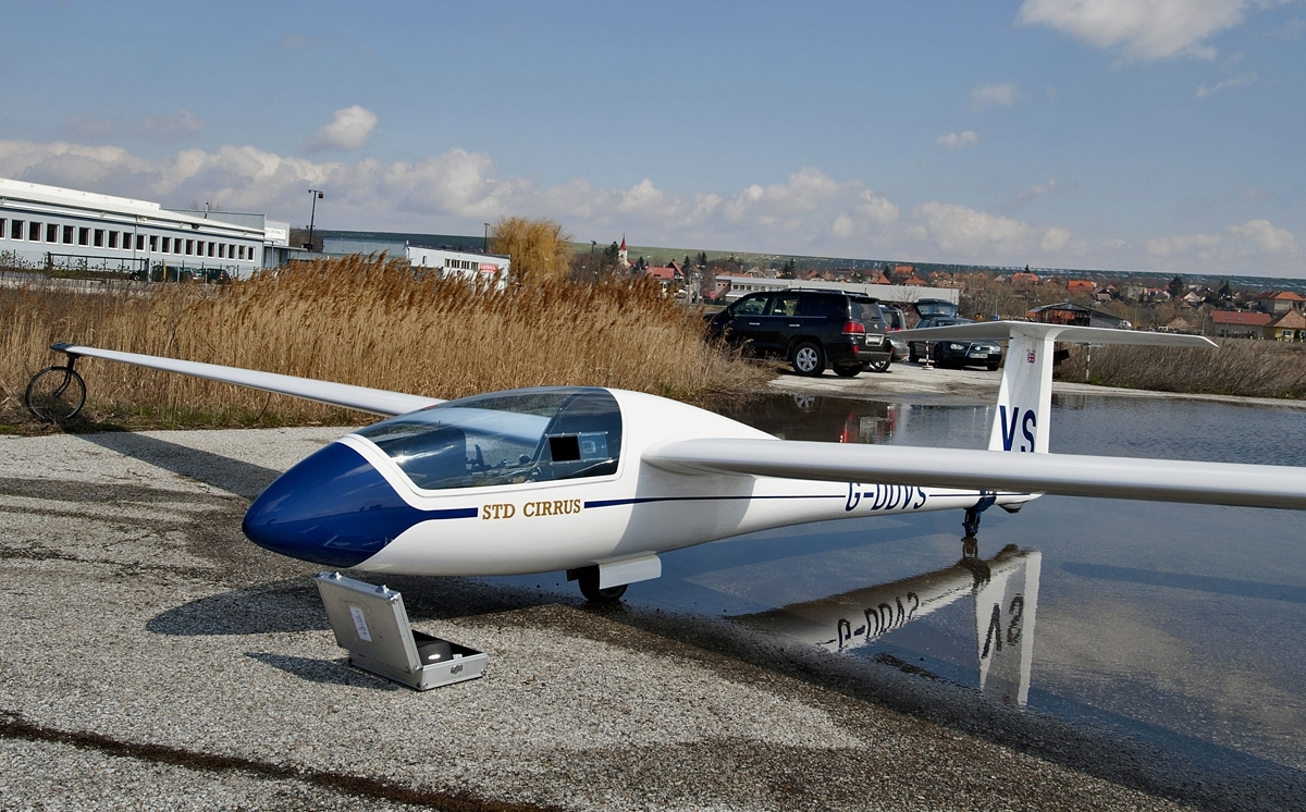 PribinaCup.Nitra 2013.Slovakia.